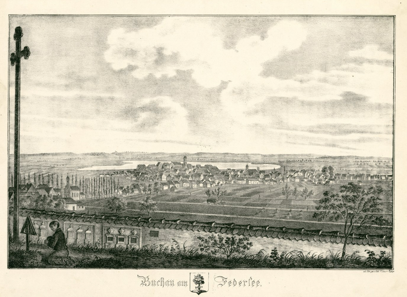 Buchau am Federsee. Lithographie.